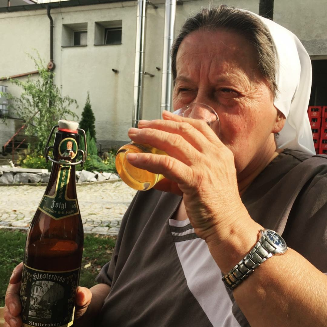 Suor Doris Enghelhard nel 2018 sorseggia la birra che produce in quel di Mallersdorf